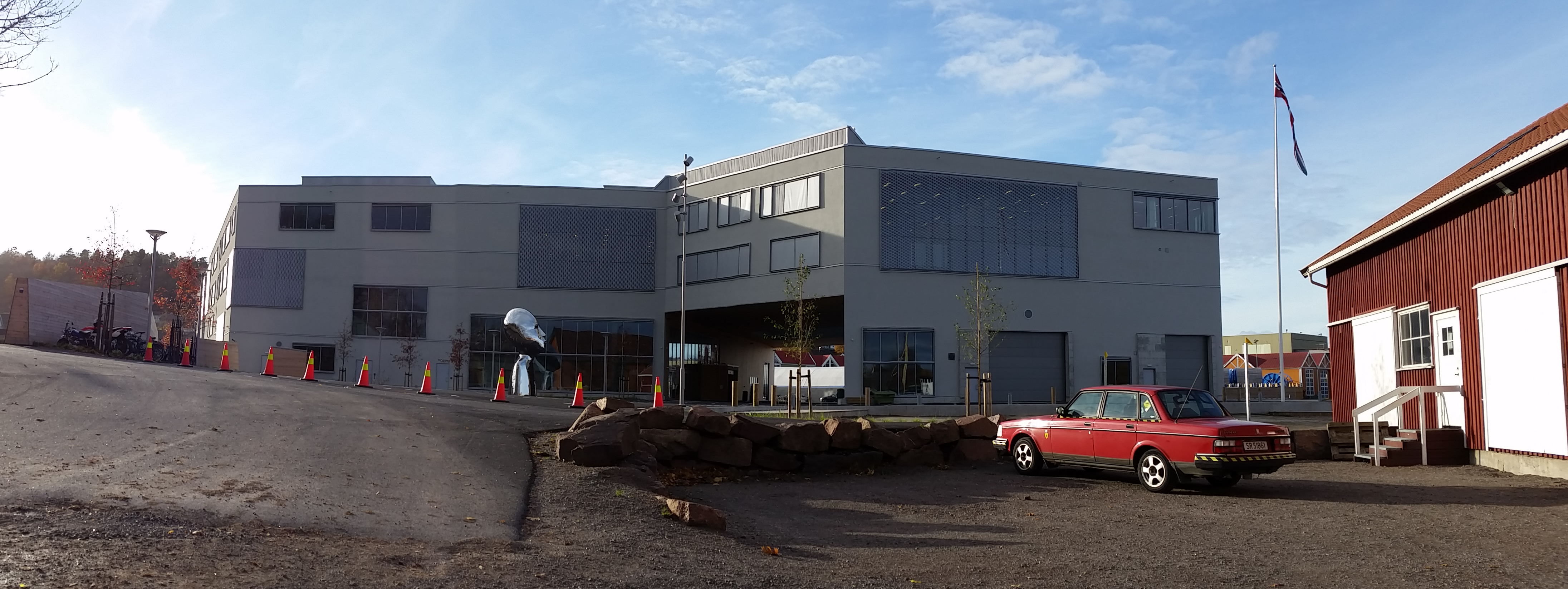 Færder videregående skole i Tønsberg.